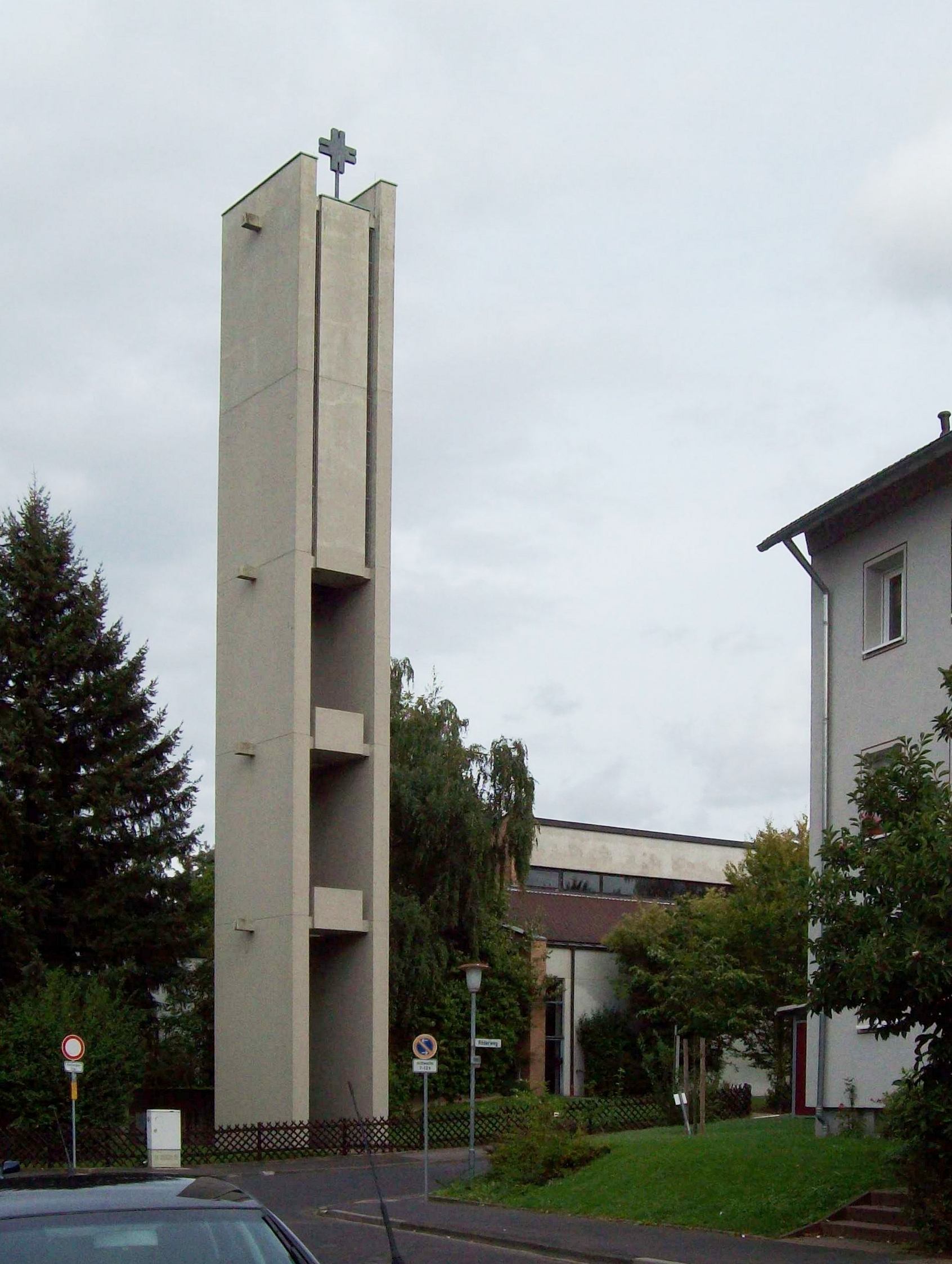 St. Pius Aschaffenburg Turmansicht